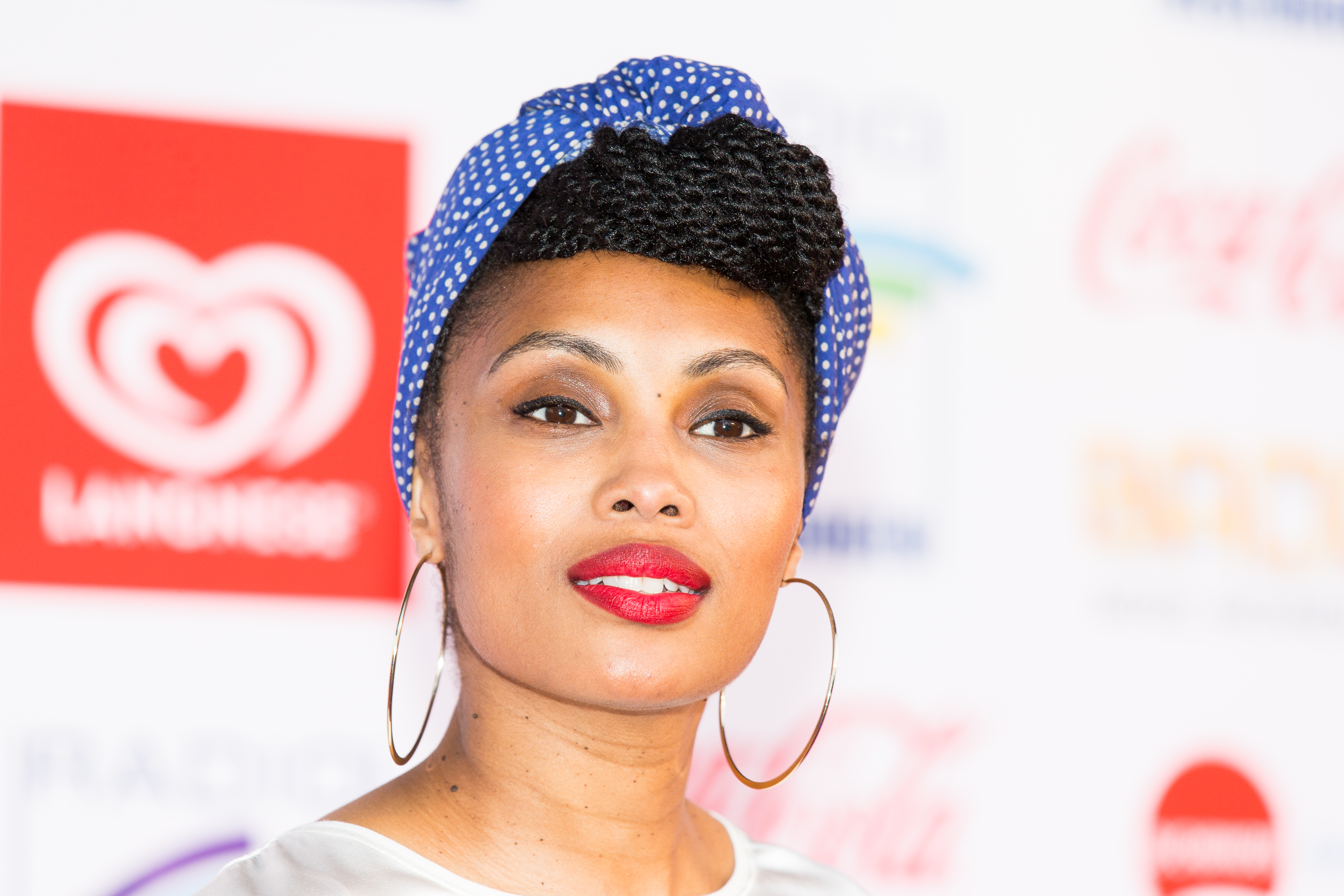 during Radio Regenbogen Award 2017 at Europapark, Rust, Baden-Württemberg, Germany on 2017-04-07, Photo: Sven Mandel